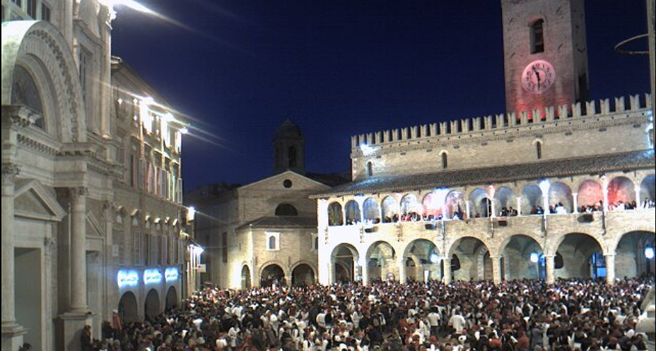 Offida piazza del Popolo giorno del bove